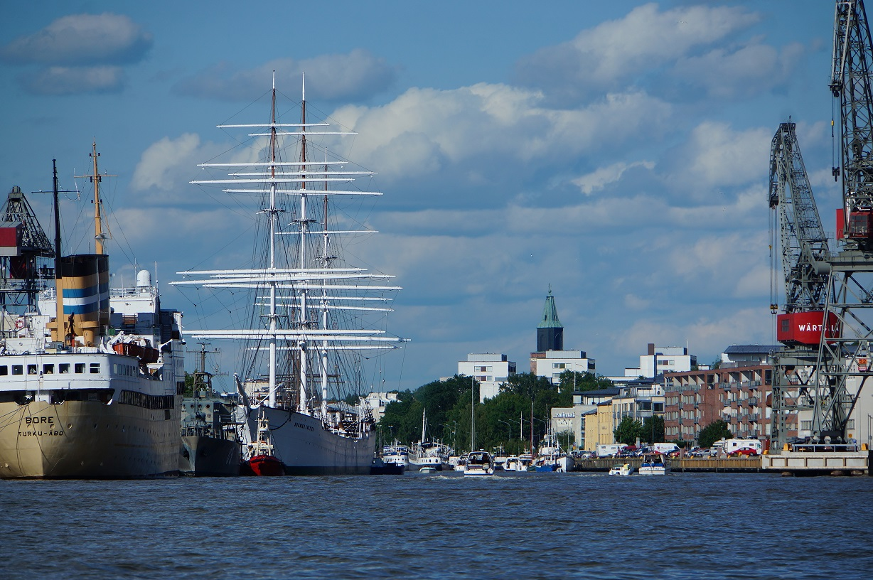 Aurajoki kuvattuna kesällä 2015 satamasta päin.